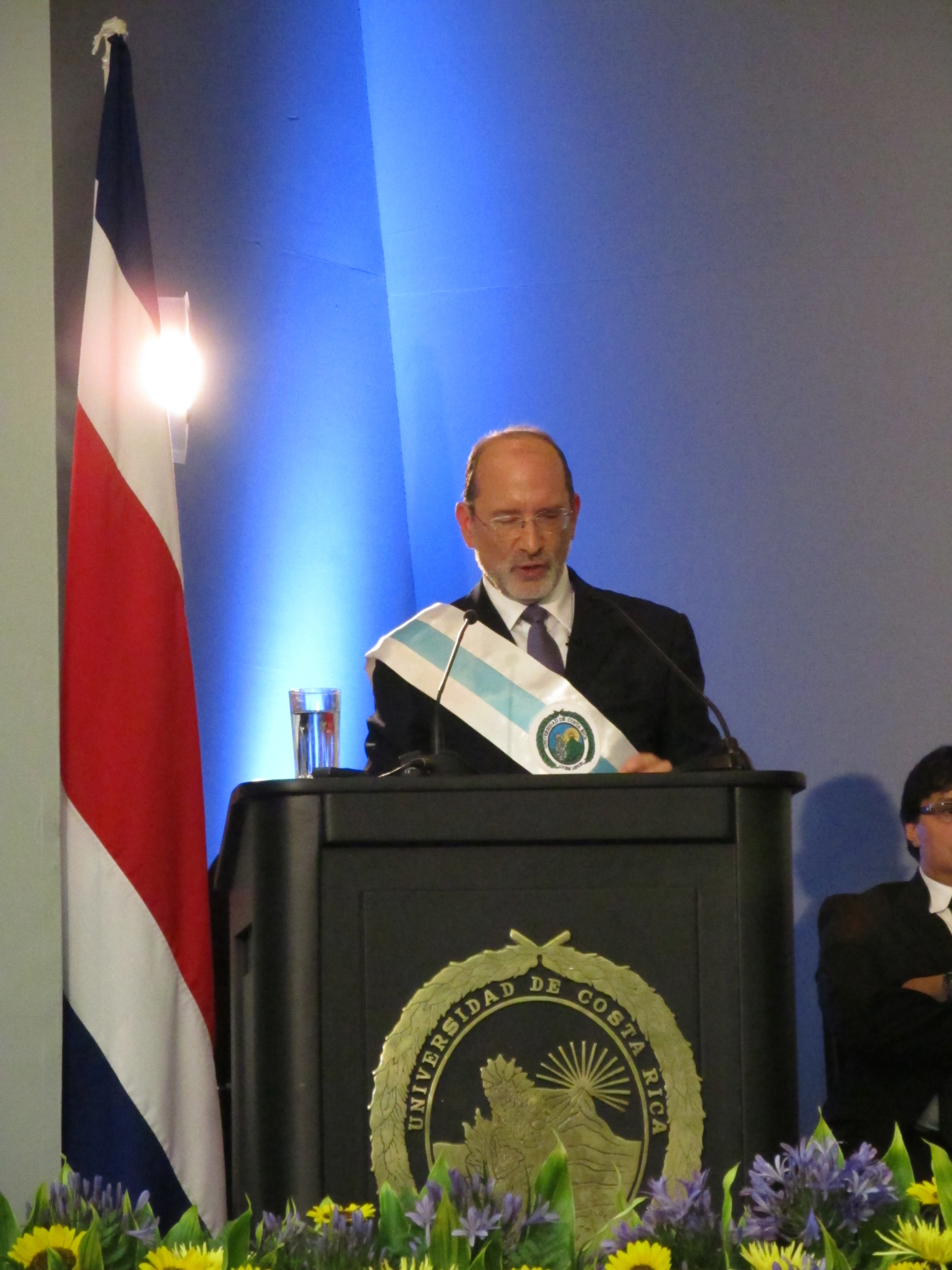 M. Henning-Jensen-Pennington, nouveau Recteur de l'Université du Costa Rica pour la période 2012-2016